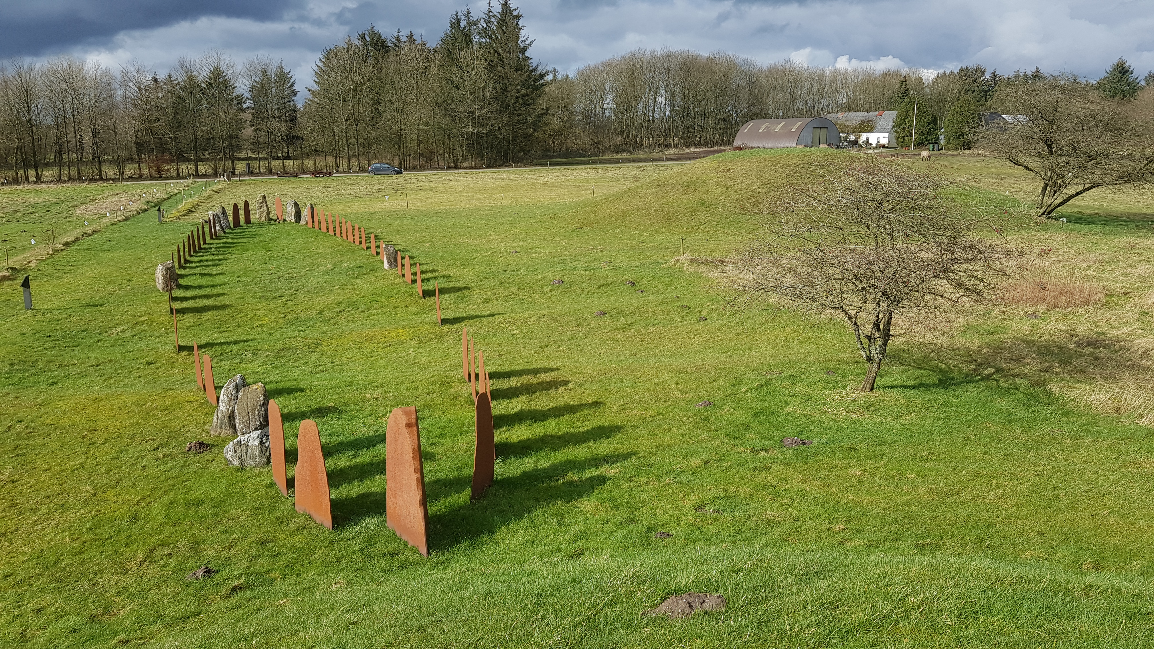 Klebæk Høje